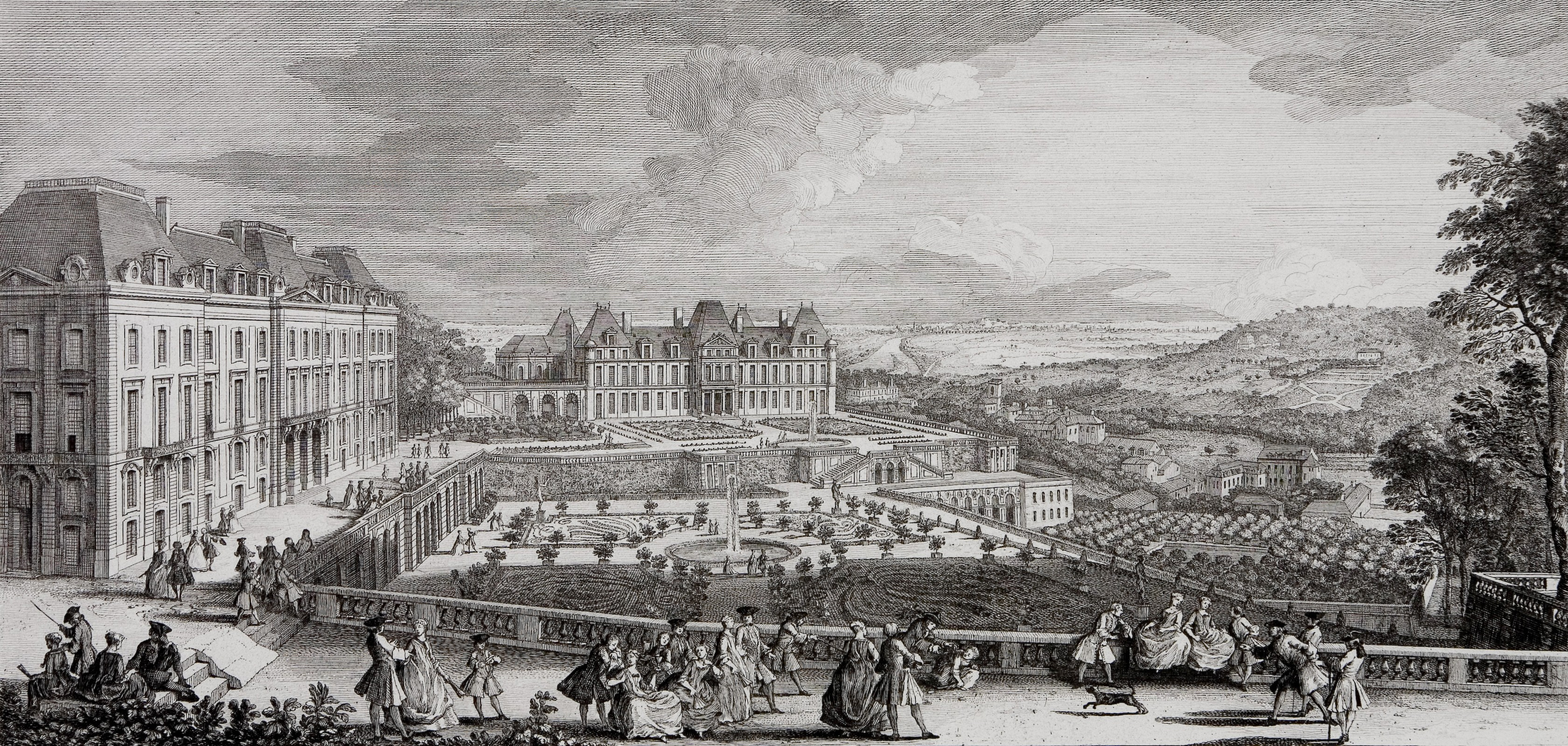 Veue du château de Meudon du côté des parterres. Gravure par Jacques Rigaud, 1733. Vue prise du parterre du Globe montrant le château Vieux et le château Neuf au début du XVIIIe siècle.